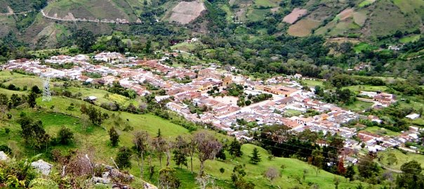 Vista del municipio de Matanza desde el Cerro de la Virgen